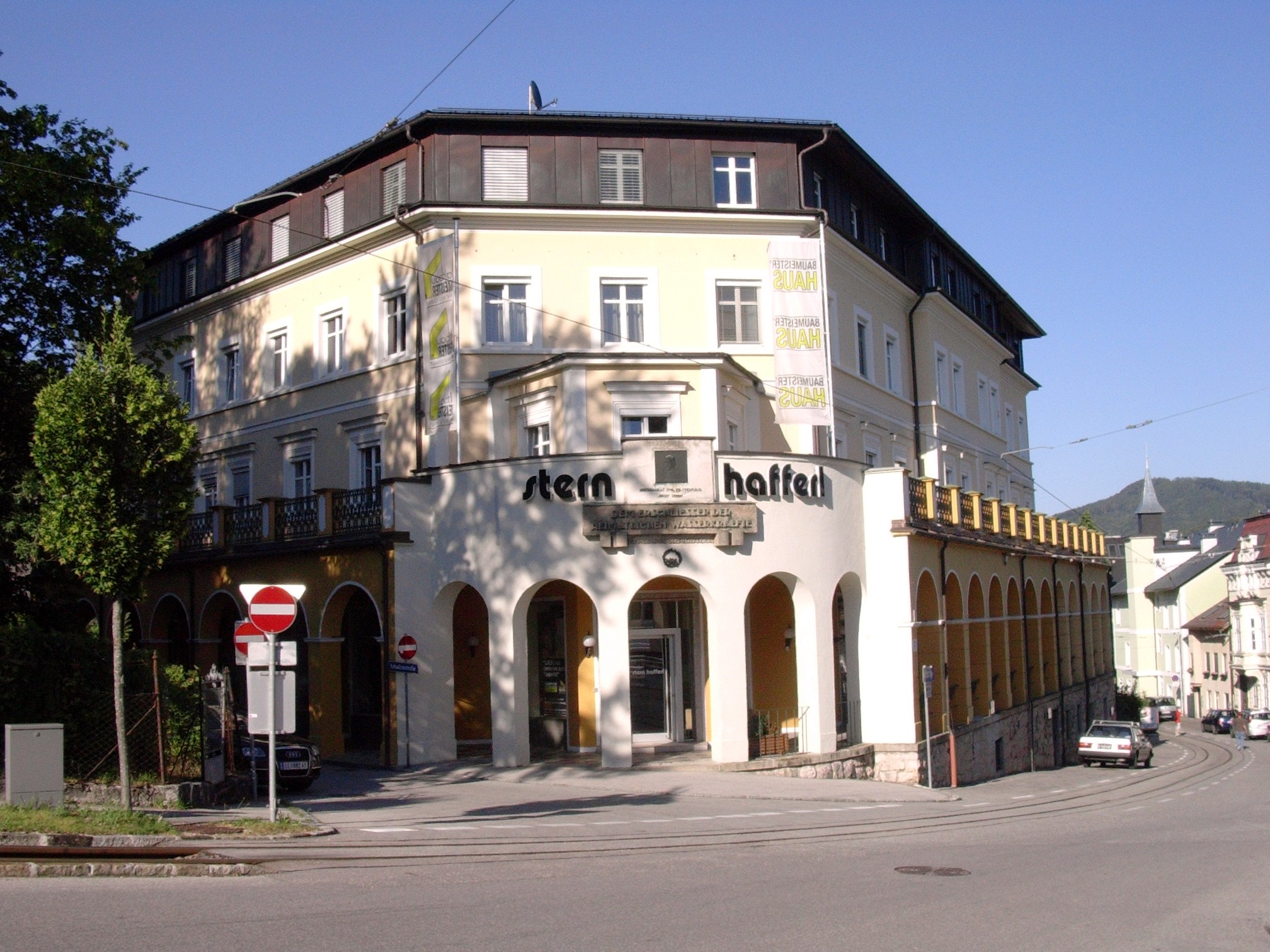 Arkardenhaus - Stern & Hafferl